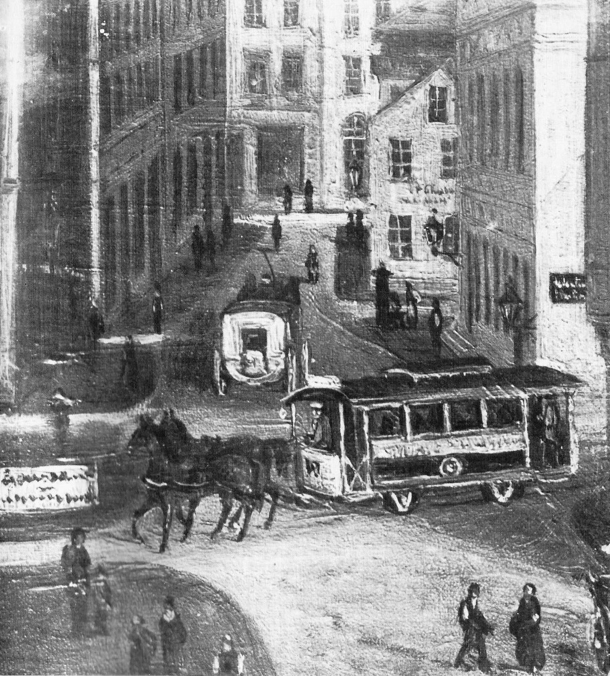 Pferdebahnwagen an der Kreuzung Braunstraße/Schüsselbuden. Ausschnitt aus einem Gemälde von Conrad Weidmann.